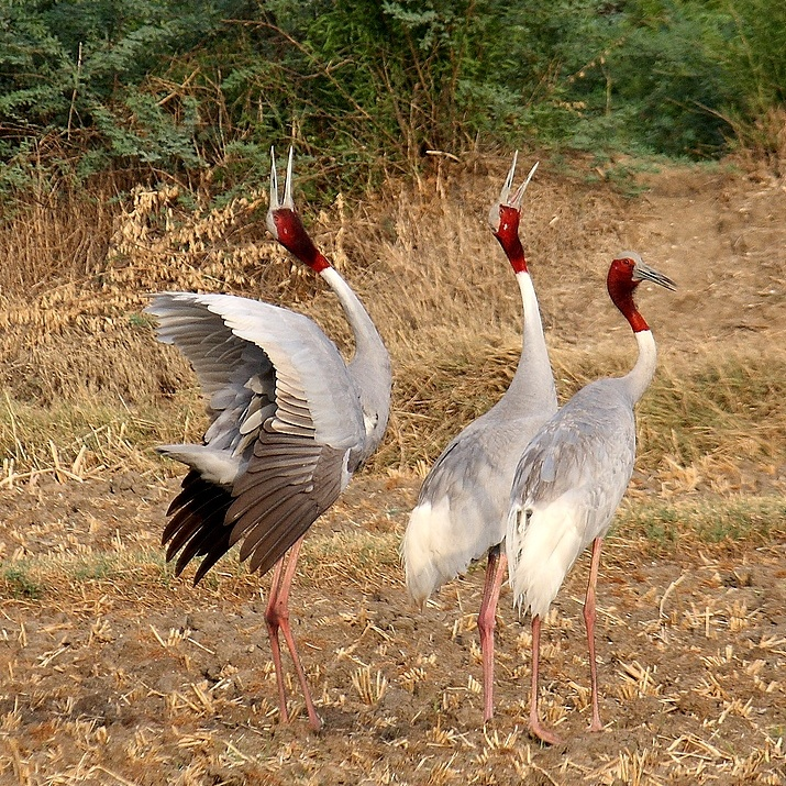 Sarus Crane (Grus antigone)